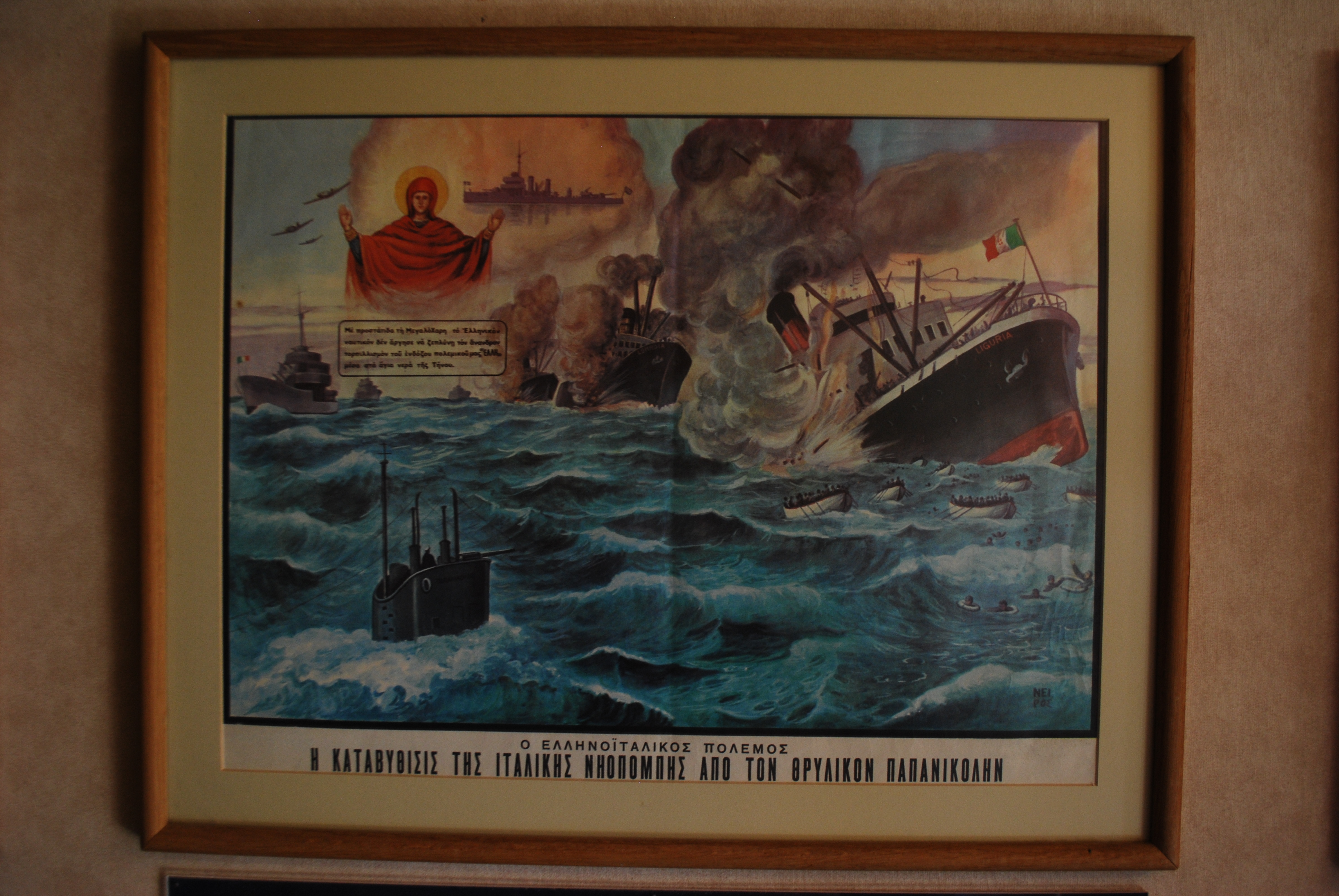 Vue du Grand Météore.